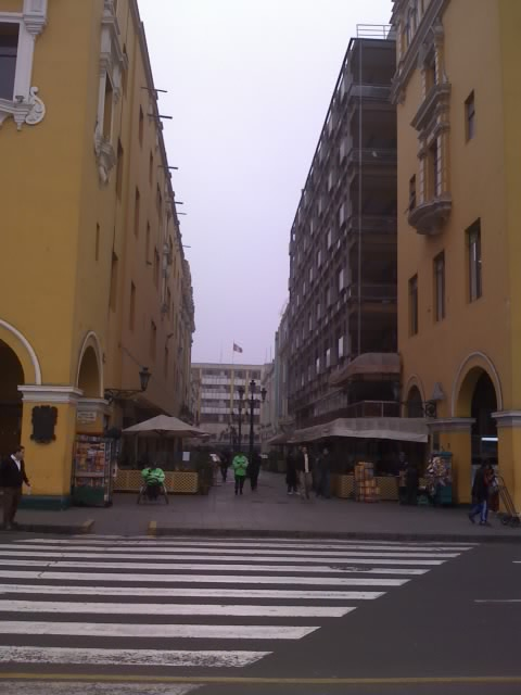 Pasaje Olaya en la plaza de armas de Lima